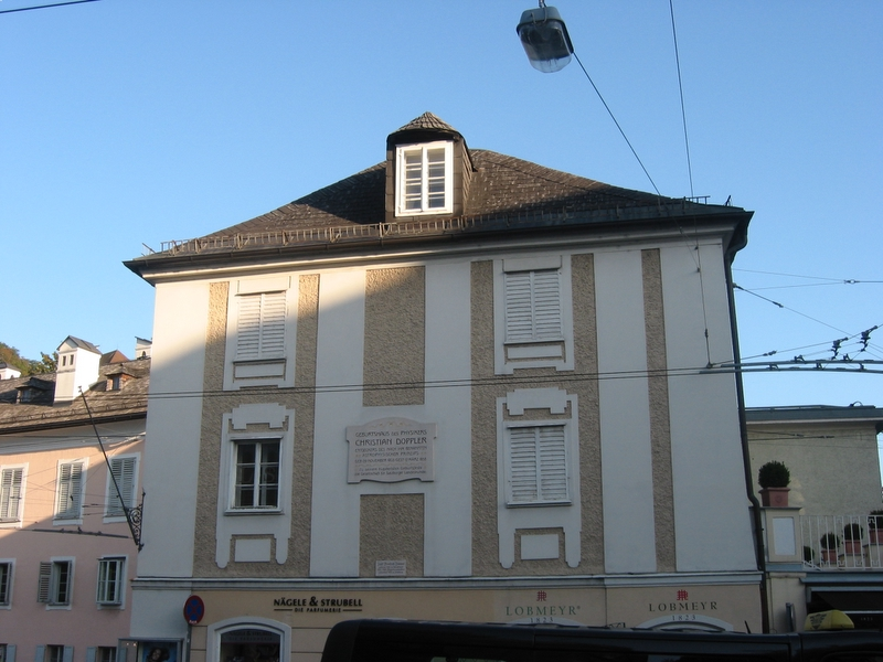 בית הולדתו של he:כריסטיאן דופלר בעיר he:זלצבורג. צולם על ידי.